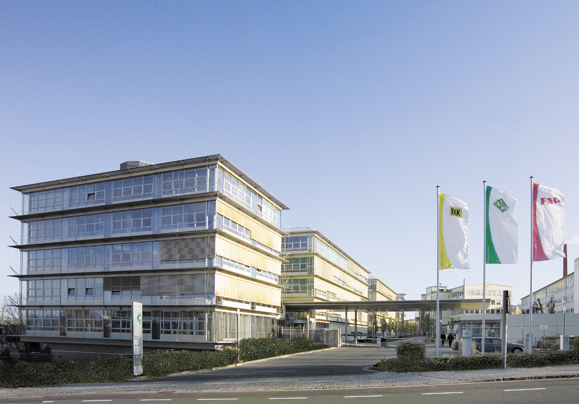 Stammsitz der INA Holding Schaeffler KG